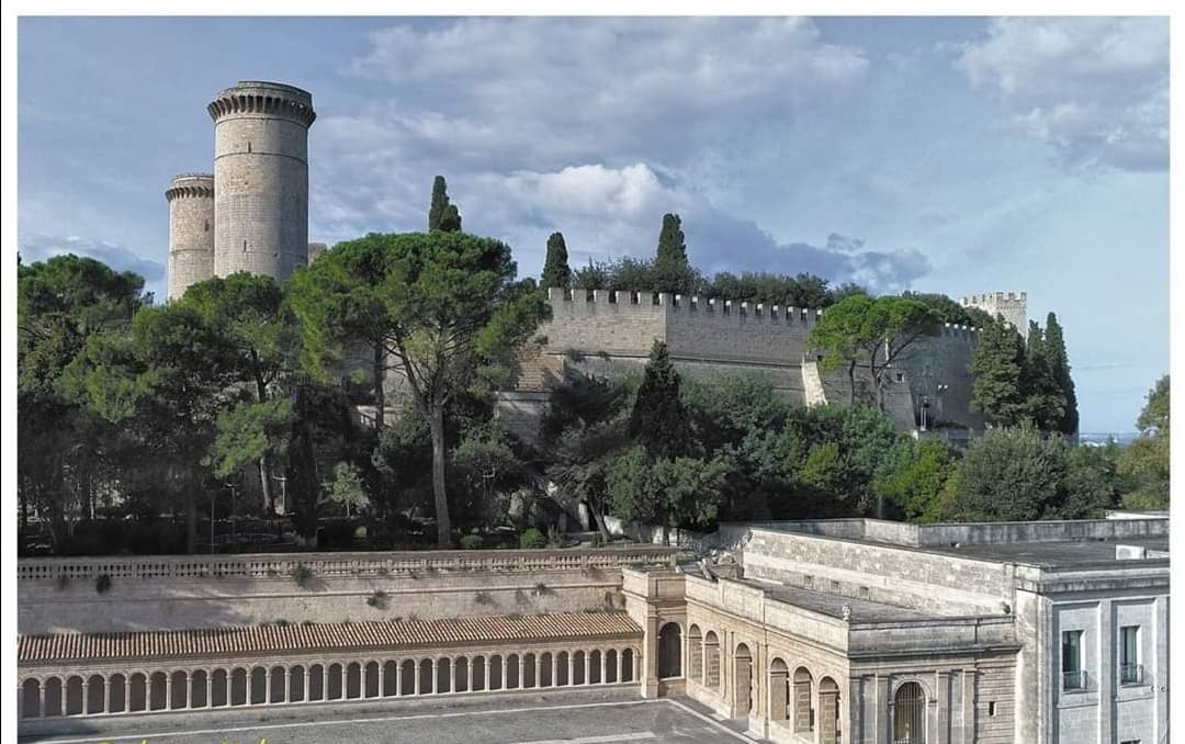 castello svevo di Oria fatto edificare nel 1223 da Federico secondo